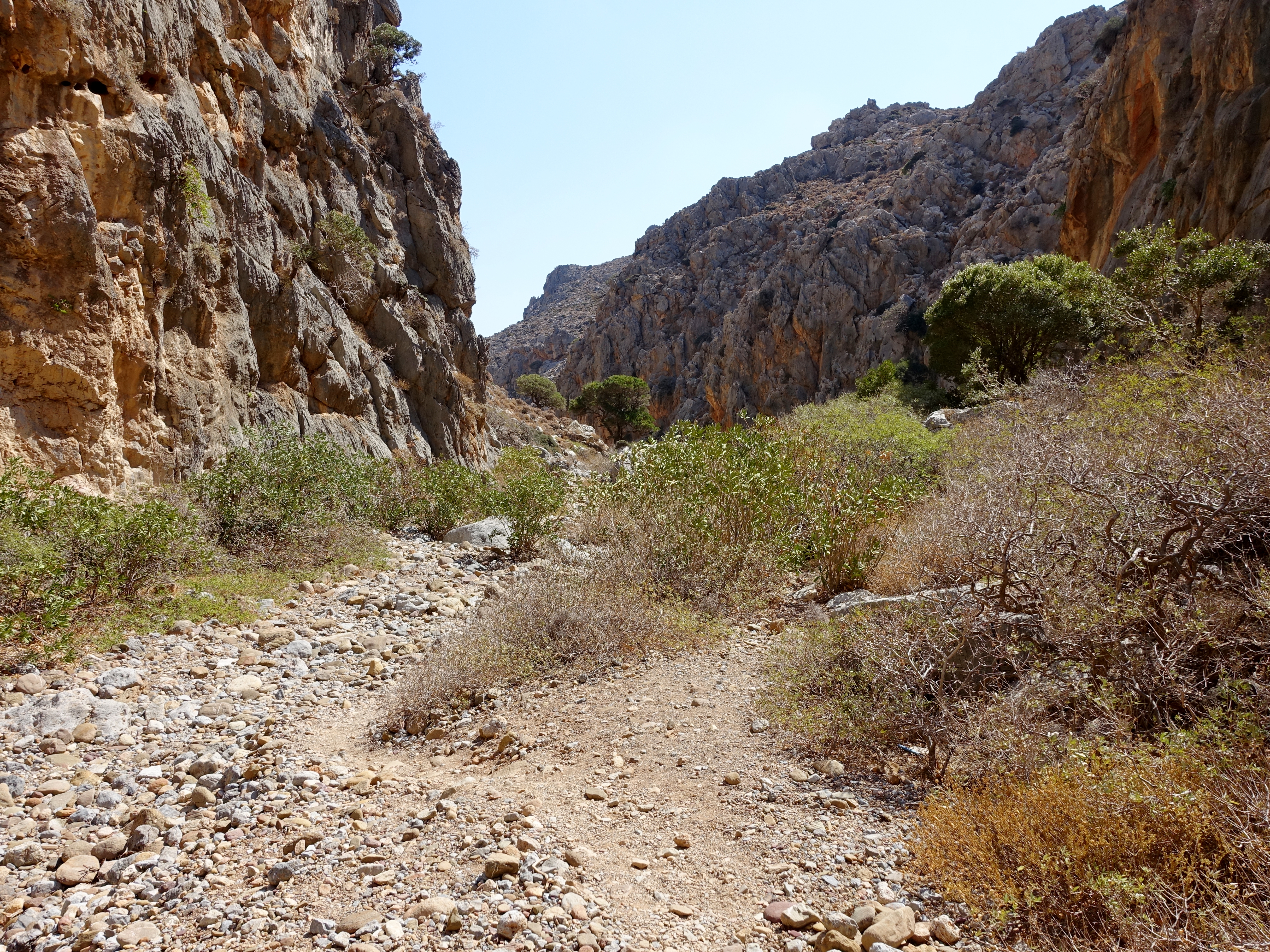 Chochlakies-Schlucht (Φαράγγι Χοχλακιών), Gemeinde Sitia, Kreta, Griechenland